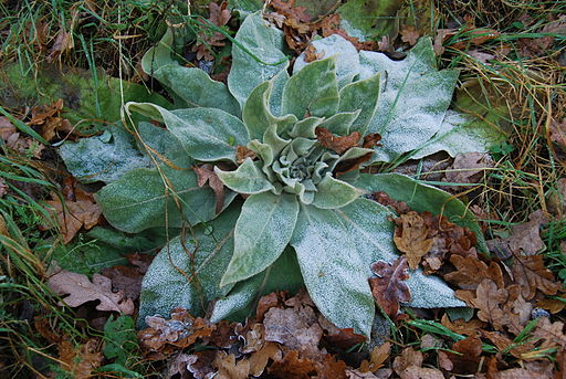 Divizna velkokvětá(Verbascum densiflorum), přízemní růžice, okres Písek. Česko.